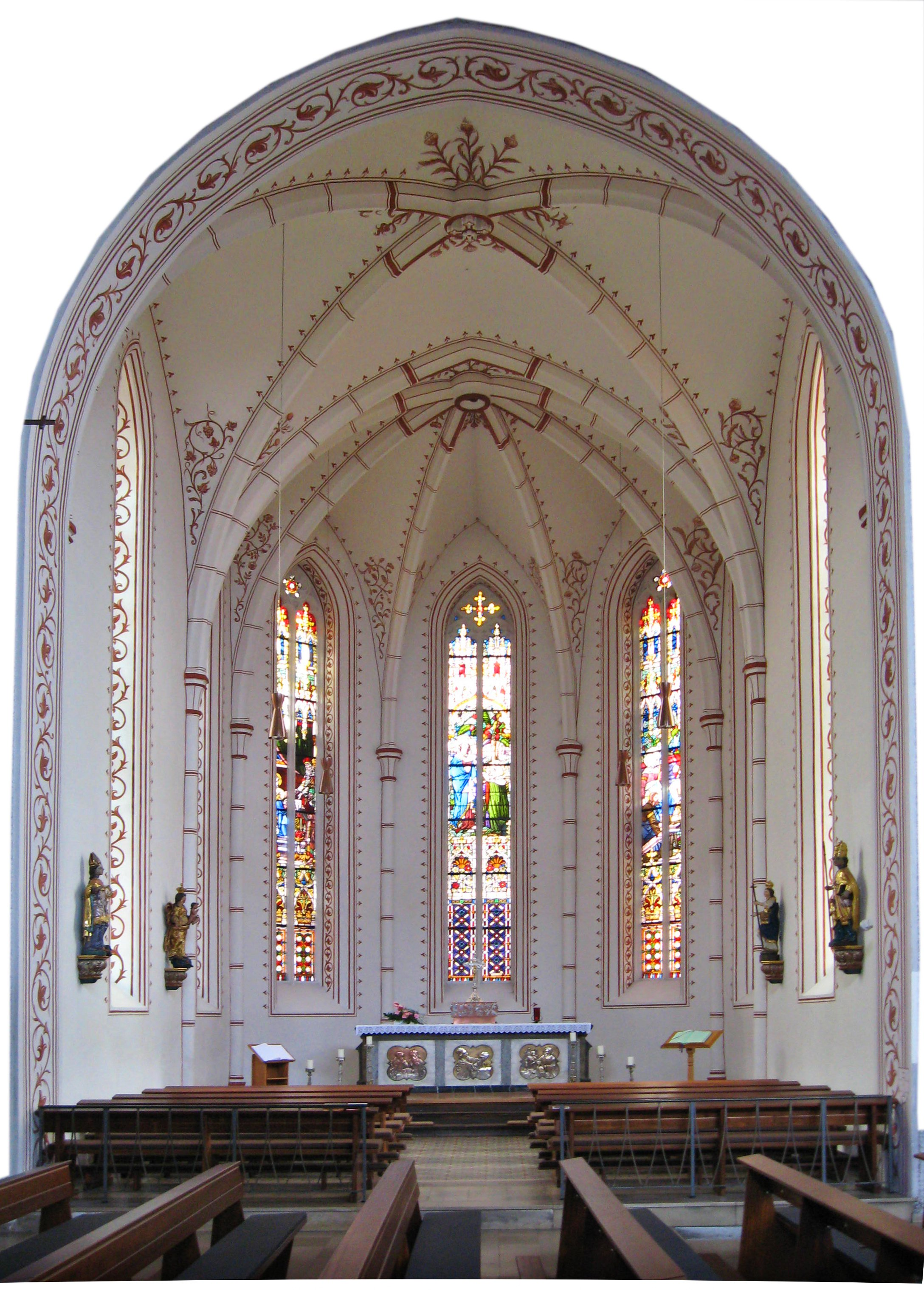 Chor der katholischen Kirche in Heusweiler